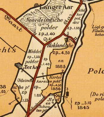 Bloklandse polder